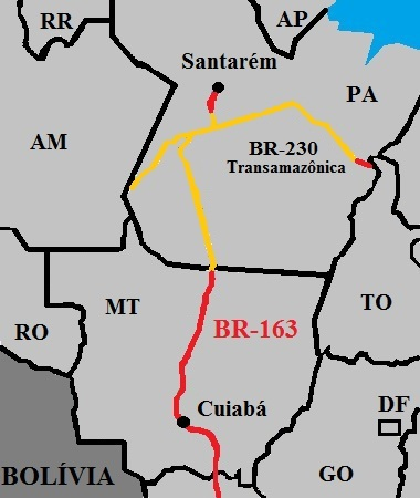 BR 163 - Cuiabá-Santarém